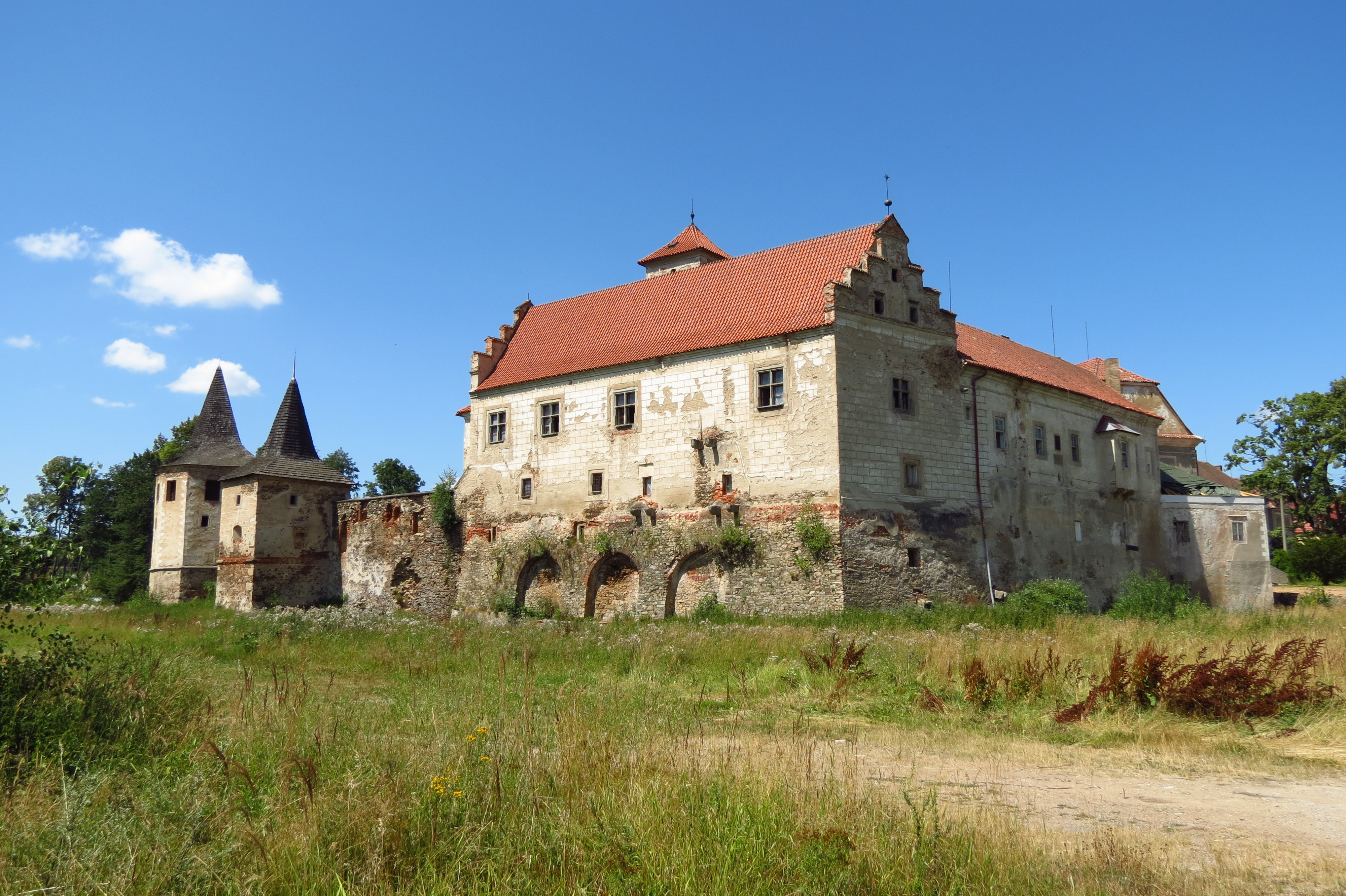 Červená Řečice, zámek